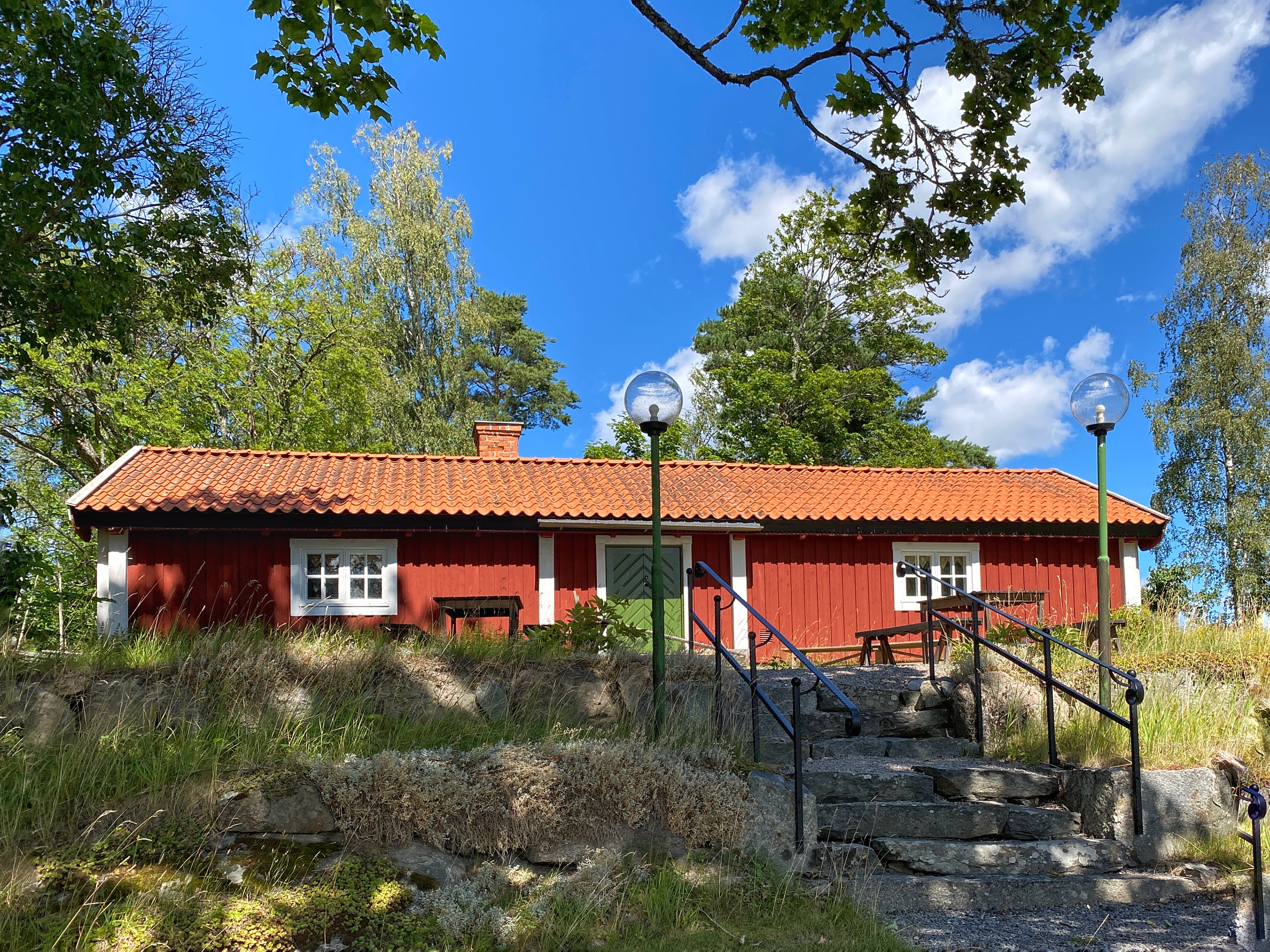 Björkviks hembygdsförenings hembygdsstuga vid Grindtorp i Björkvik.